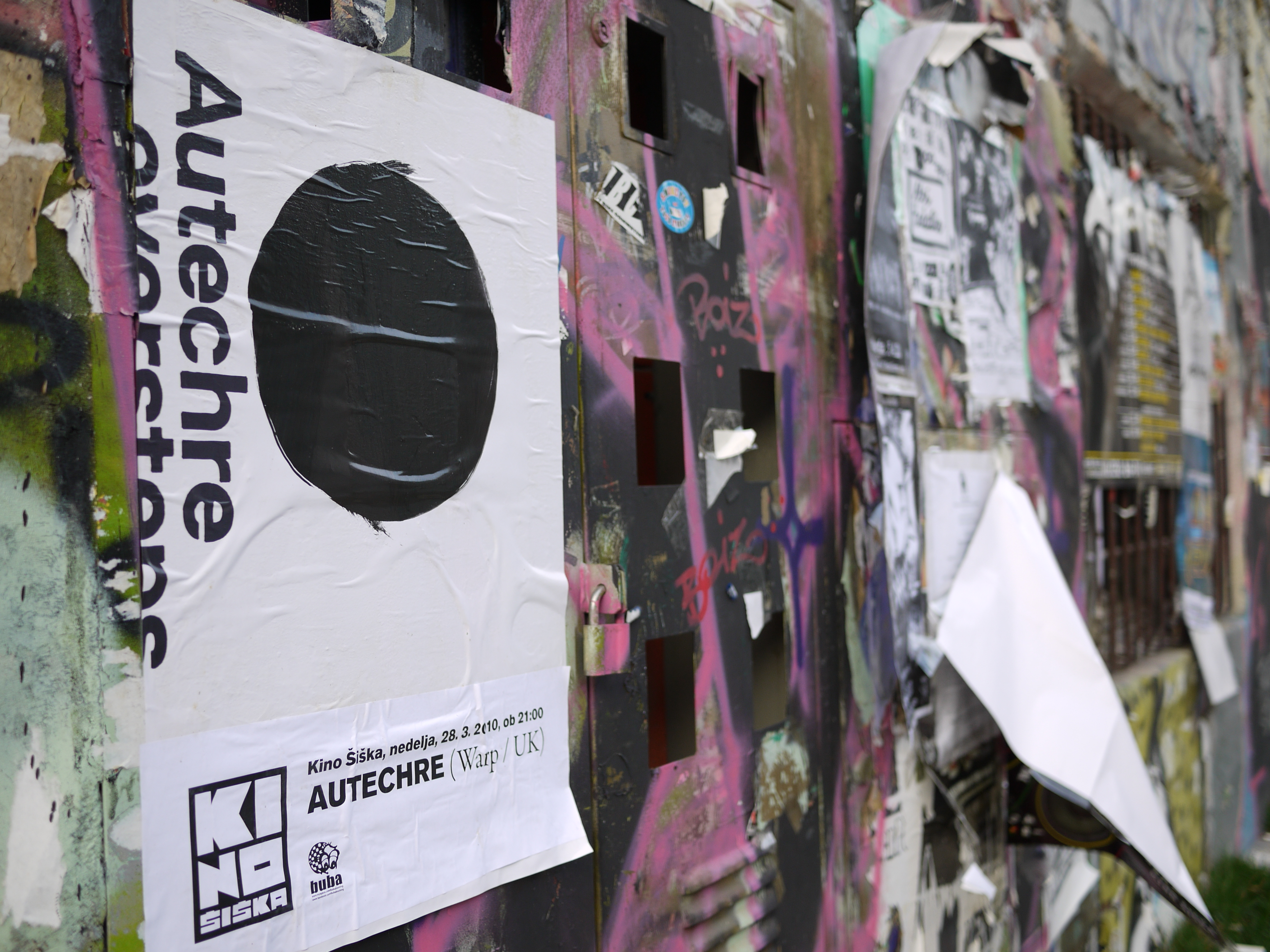 Autechre poster in Ljubljana, Slovenia